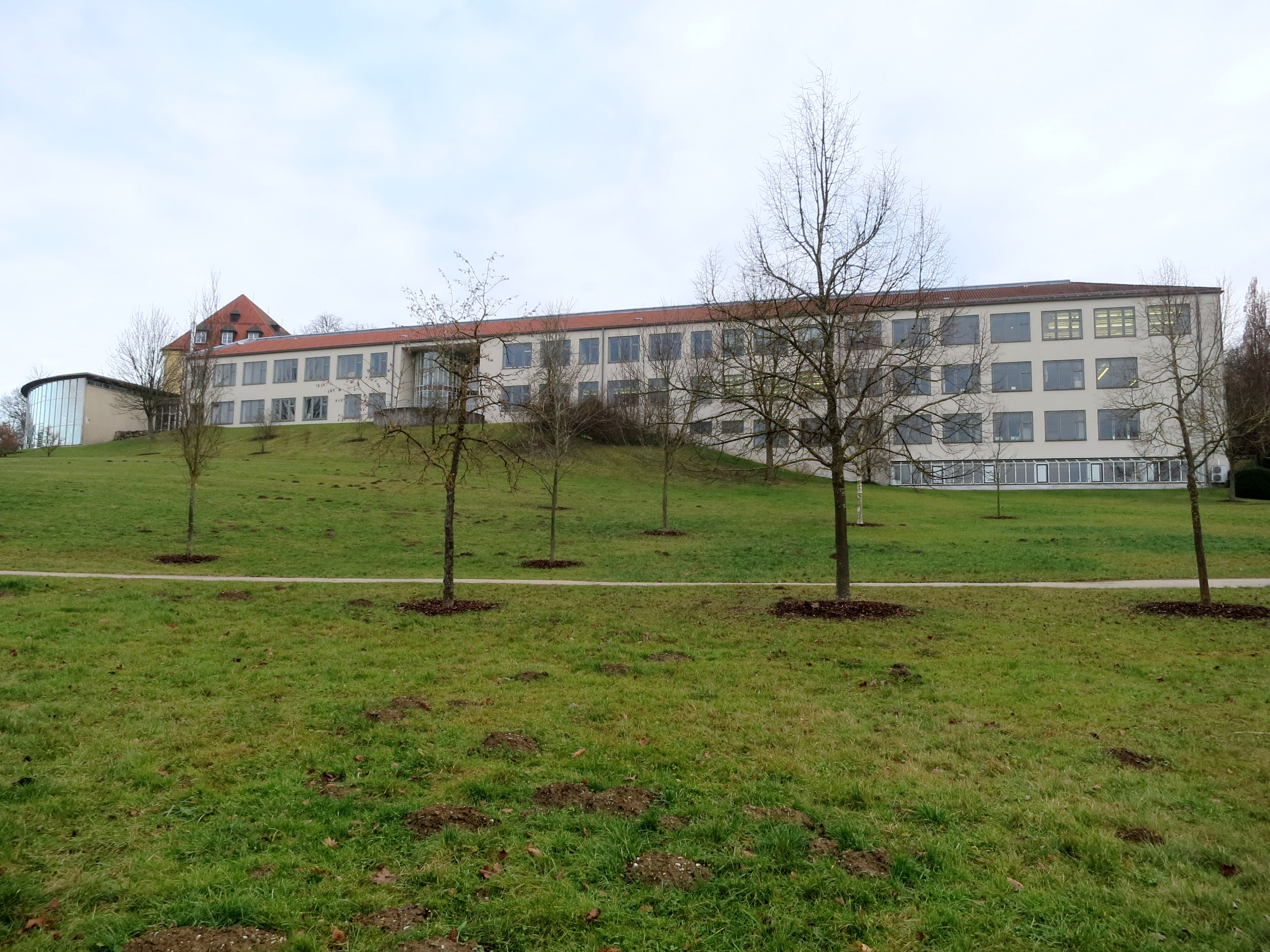 Gesamtansicht von Norden